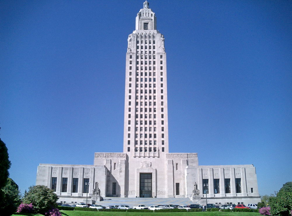 Louisiana State Capitol, Baton Rouge